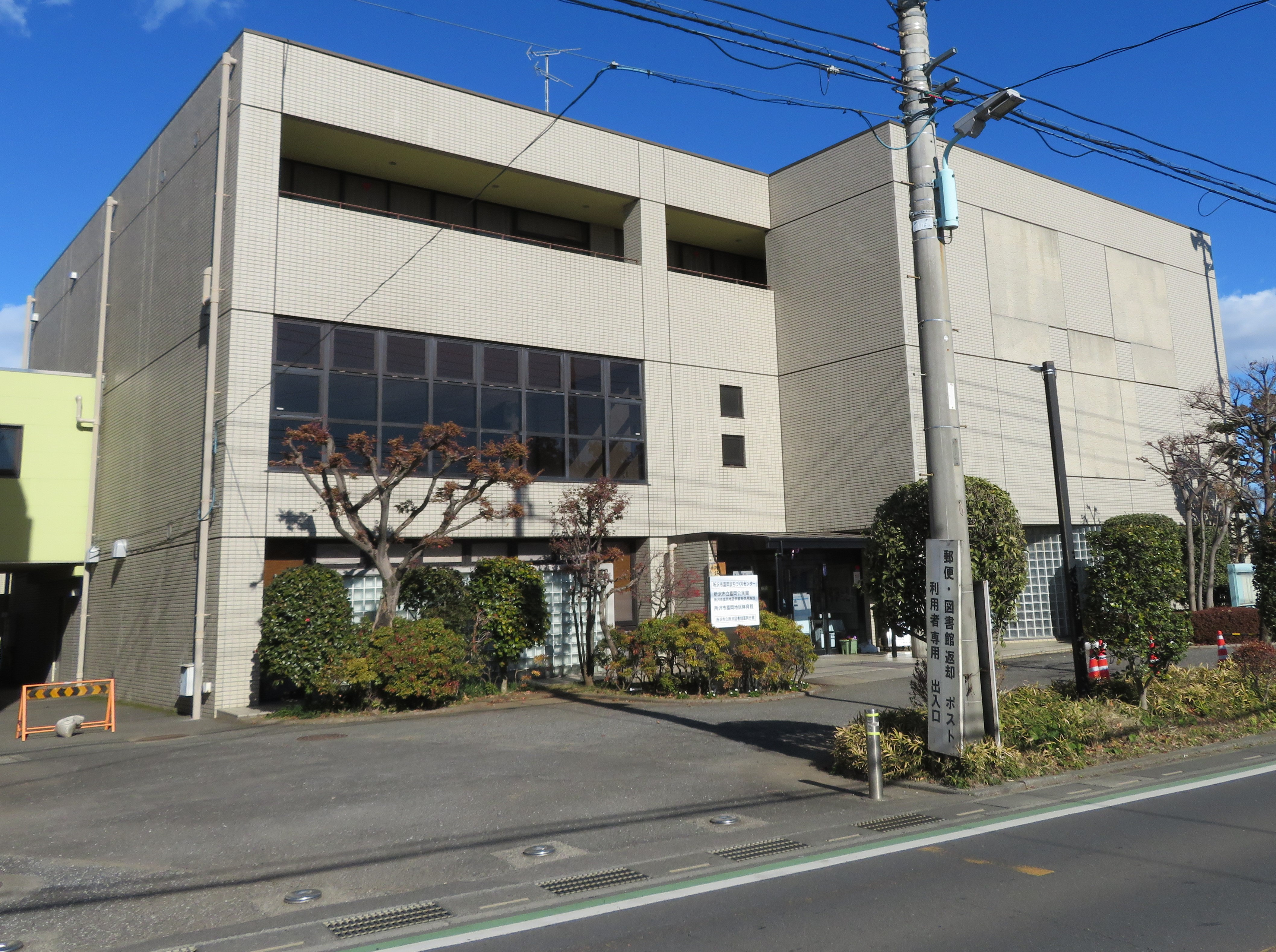 埼玉県所沢市に所在する所沢市富岡まちづくりセンター Canon PowerShot SX720 HS